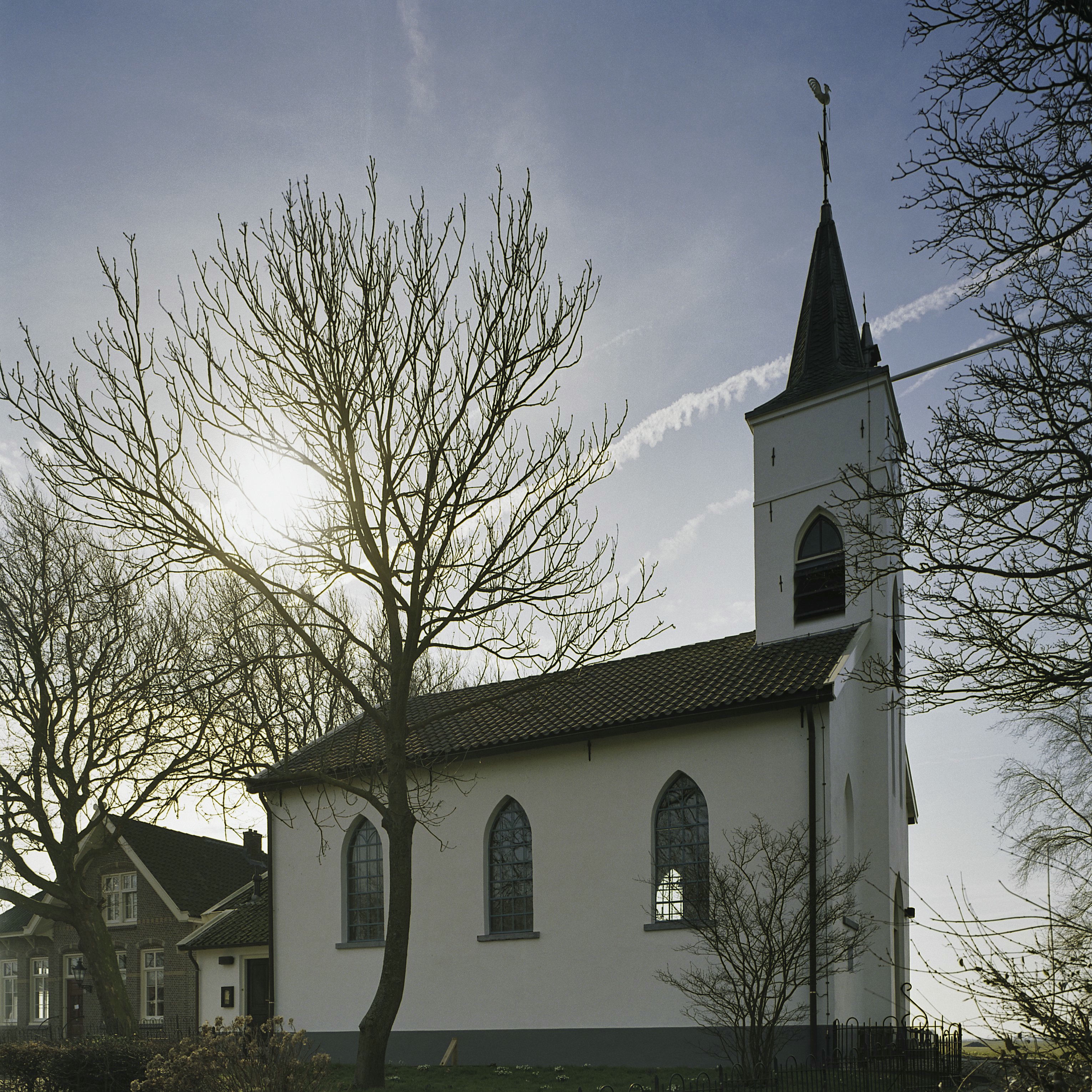 Nederlands Hervormde Kerk: Wit gepleisterde noordgevel van kerk met geveltoren (opmerking: Gefotografeerd voor Monumenten In Nederland Noord-Holland)